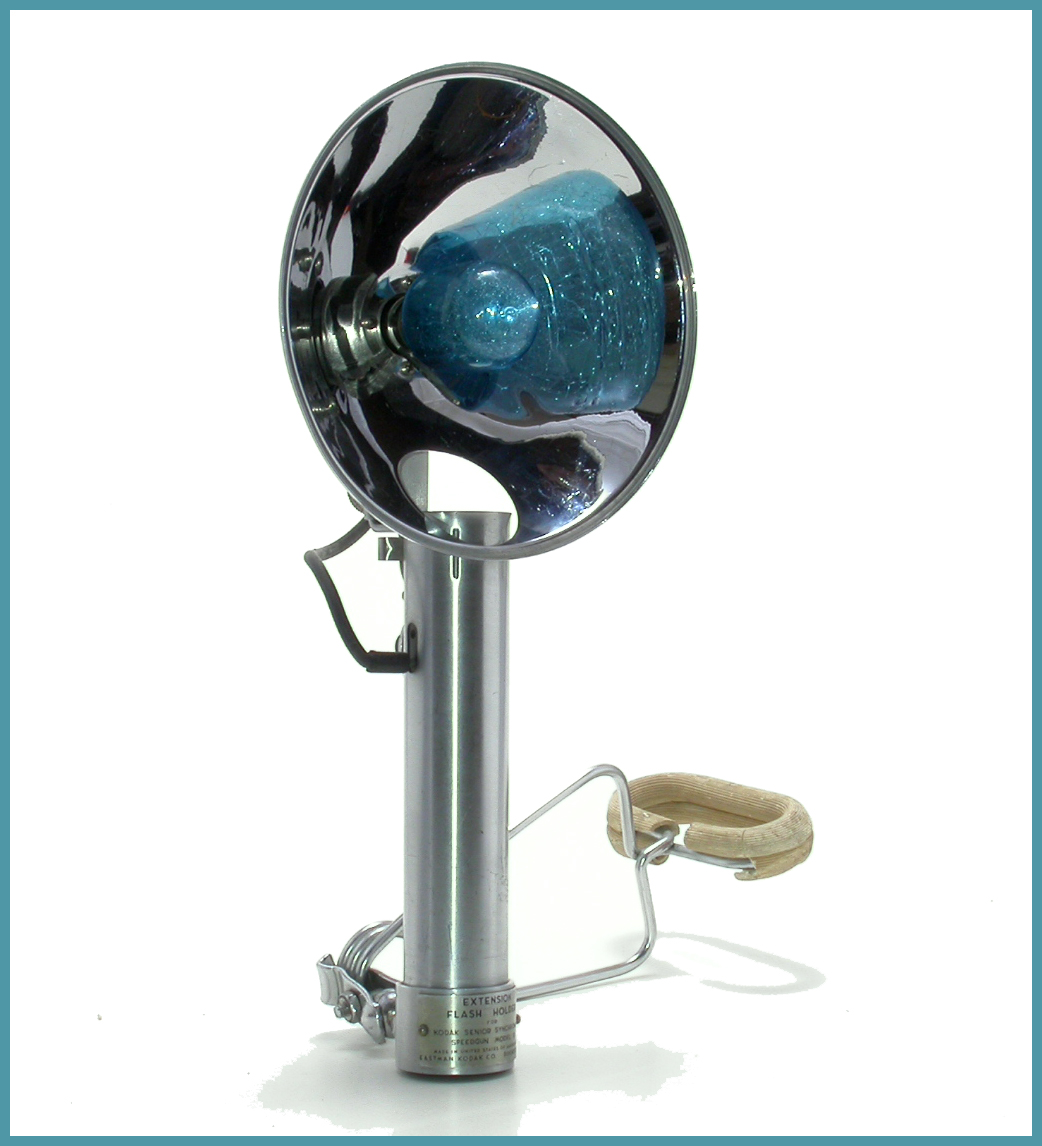 Kodak flash holder